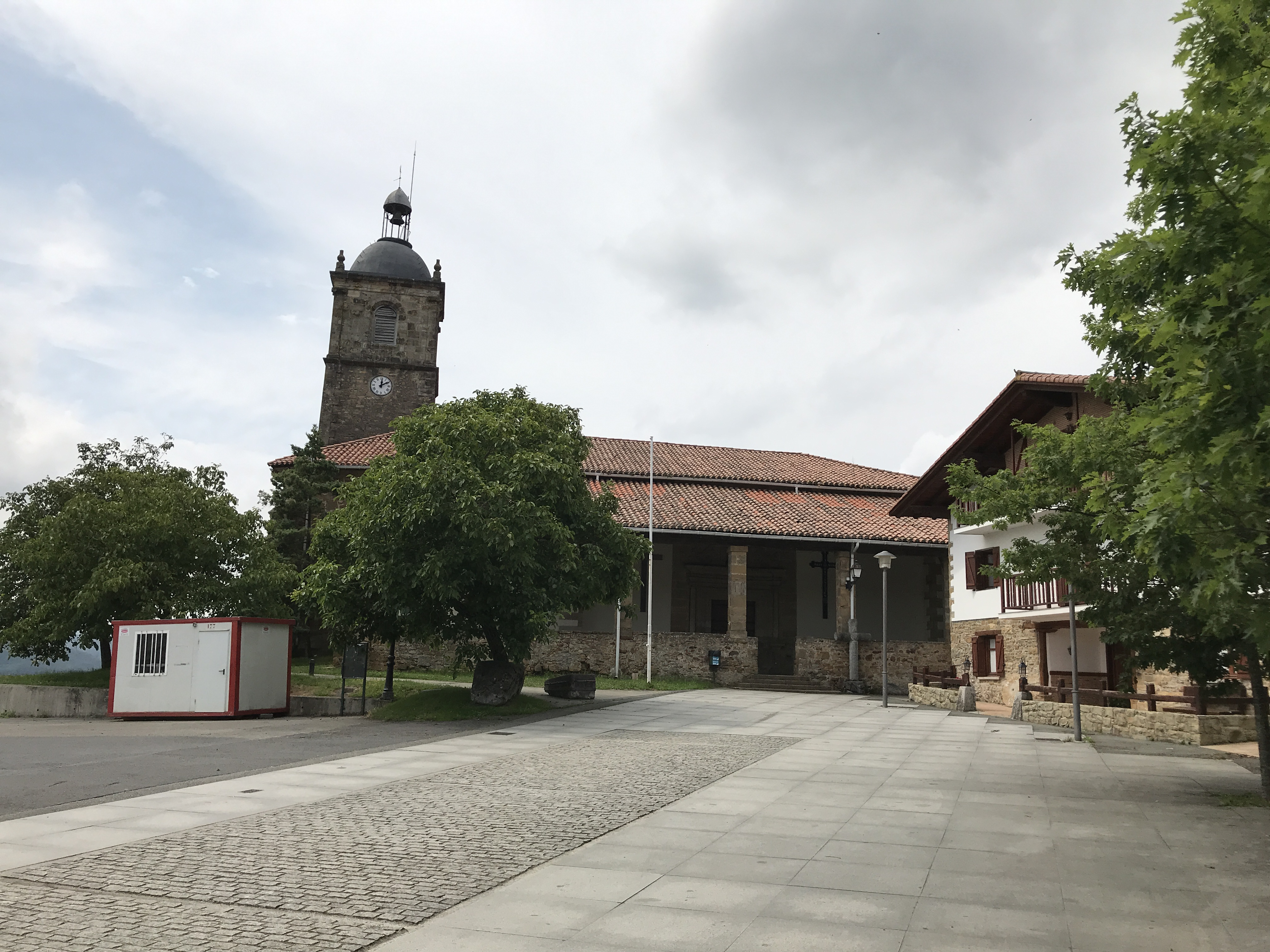 Iglesia de San Pedro y plaza del obispo Betanzos en Lumo (Vizcaya, País Vasco España)